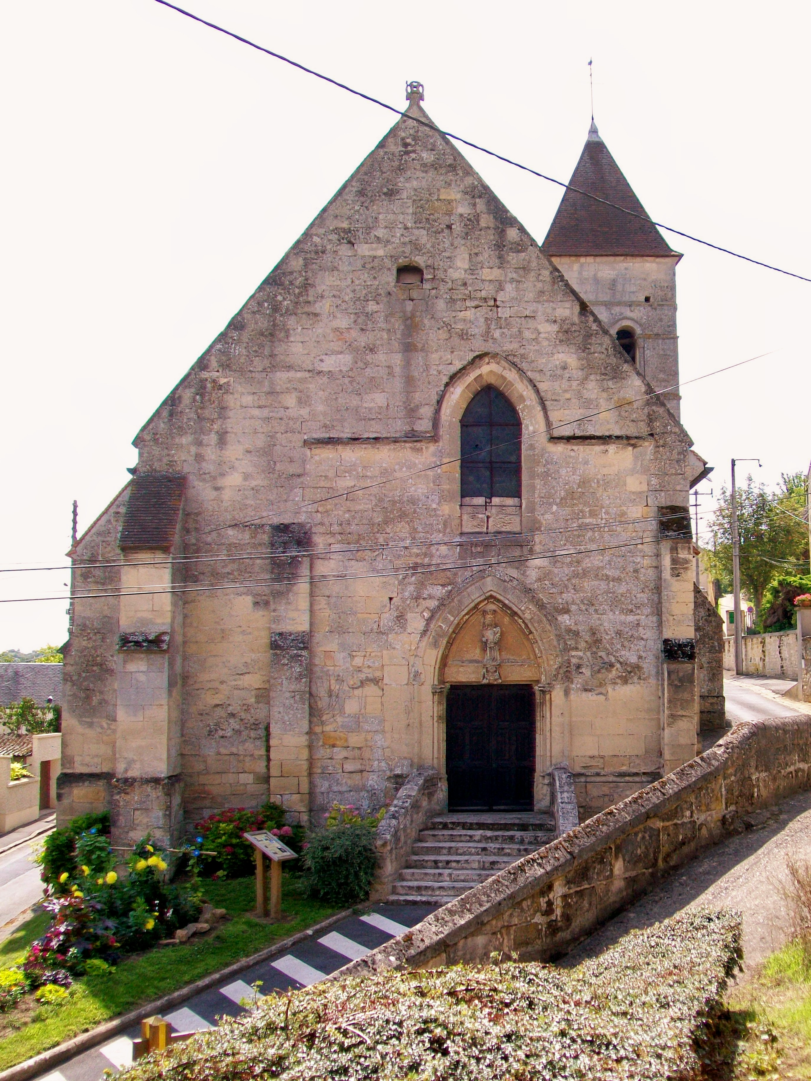 Façade nord-ouest de l'église Saint-Martin.